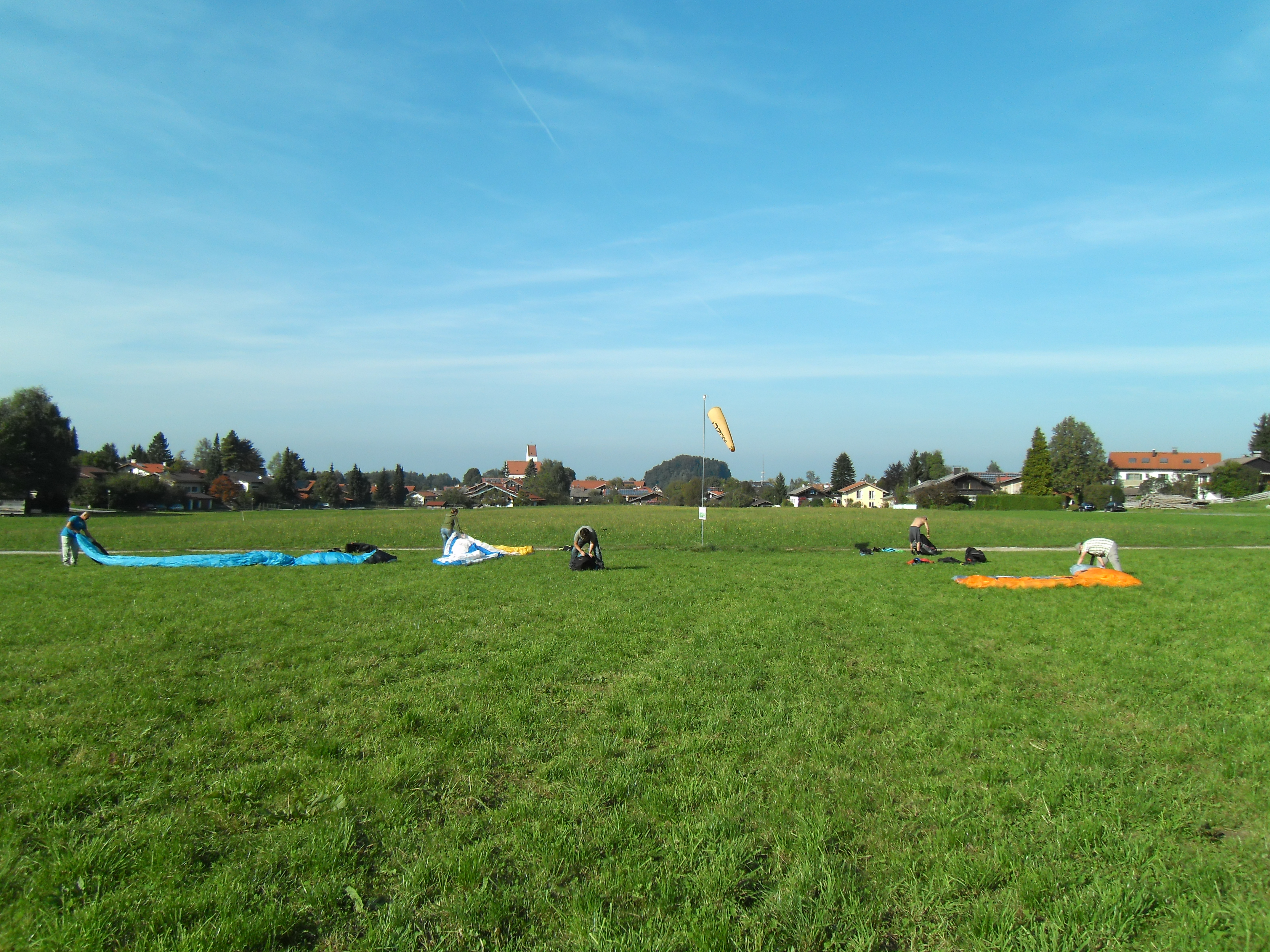 Grainbach (Gemeinde Samerberg, Lk. Rosenheim, Obb.), Landeplatz für Gleitschirm- und Drachenflieger am westlichen Dorfrand.